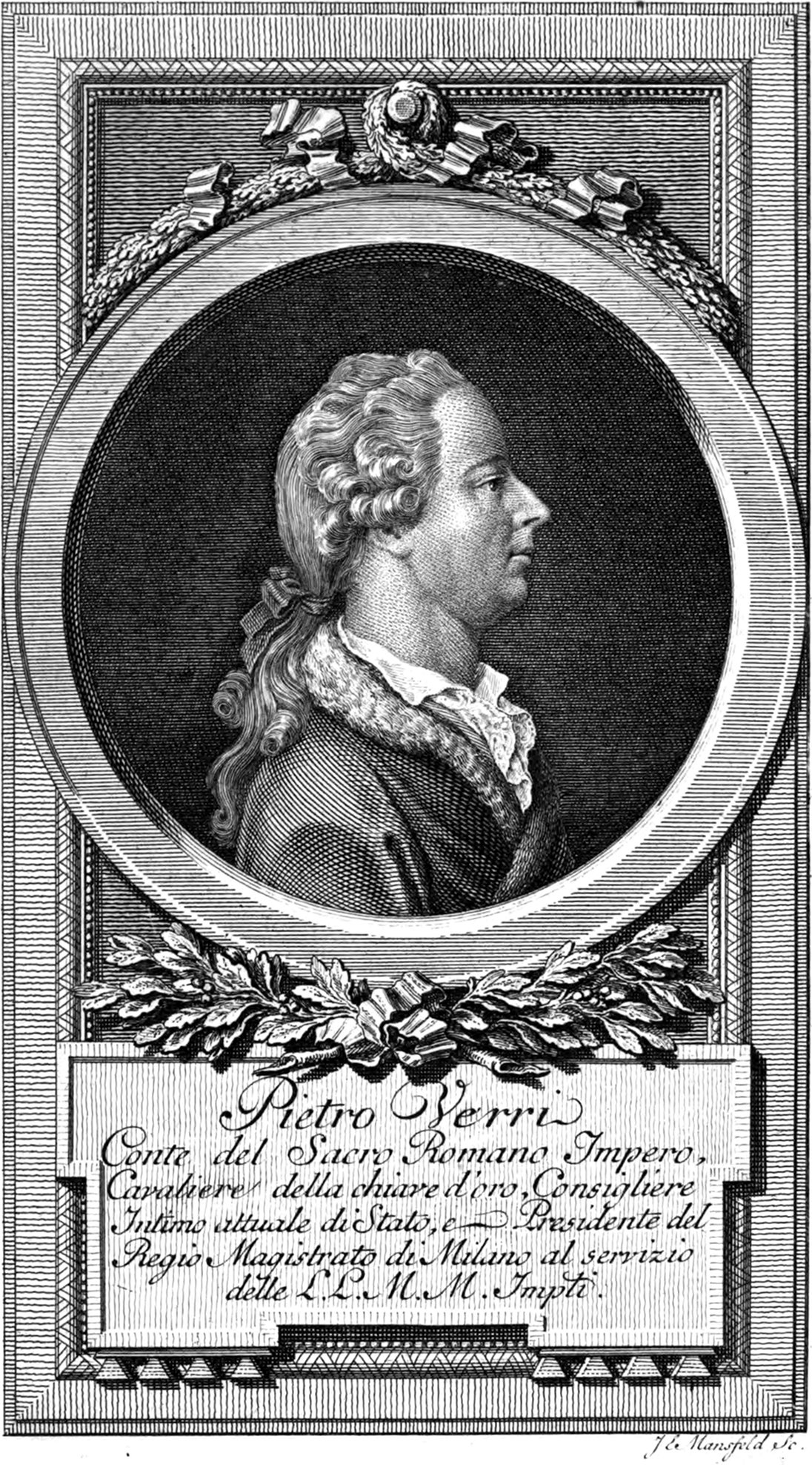 Incisione raffigurante Pietro Verri